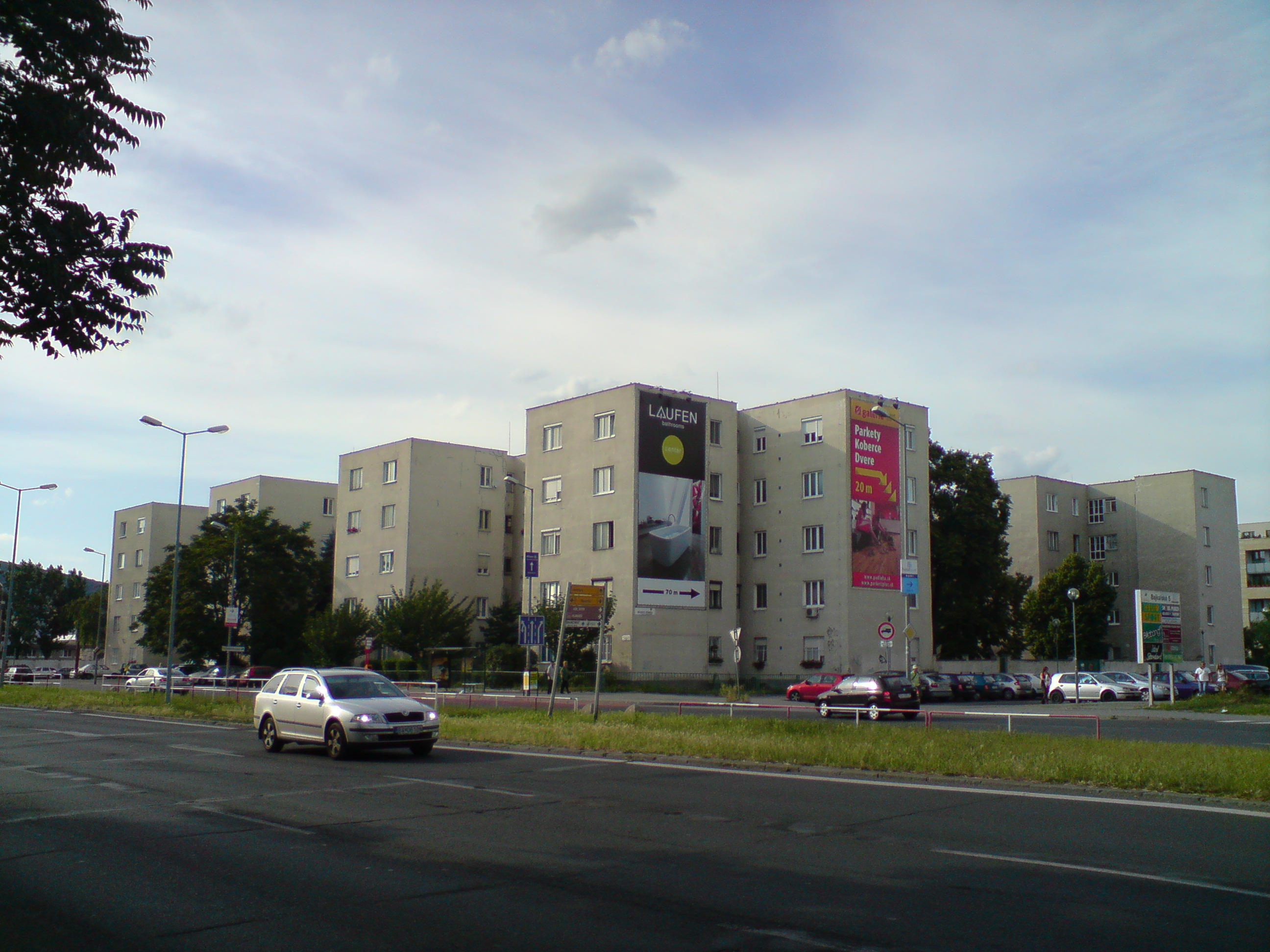 Bajkalská